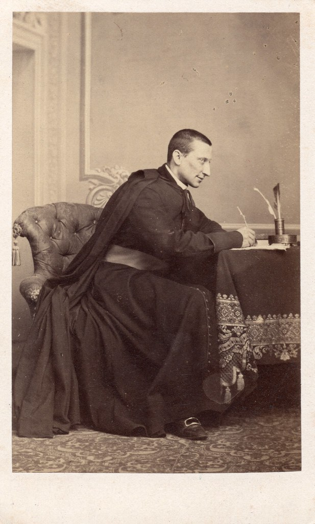 Mgr. Xavier de Merode, autore ignoto, riproduzione da foto ottocentesca, ritratto di De Merode, opera il cui autore è morto da più di 70 anni, acquisita da scanner